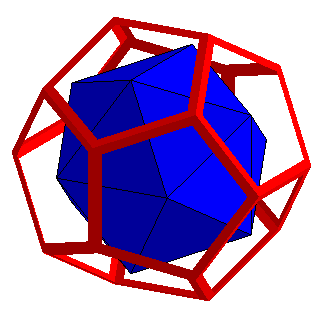 dual du dodécaèdre